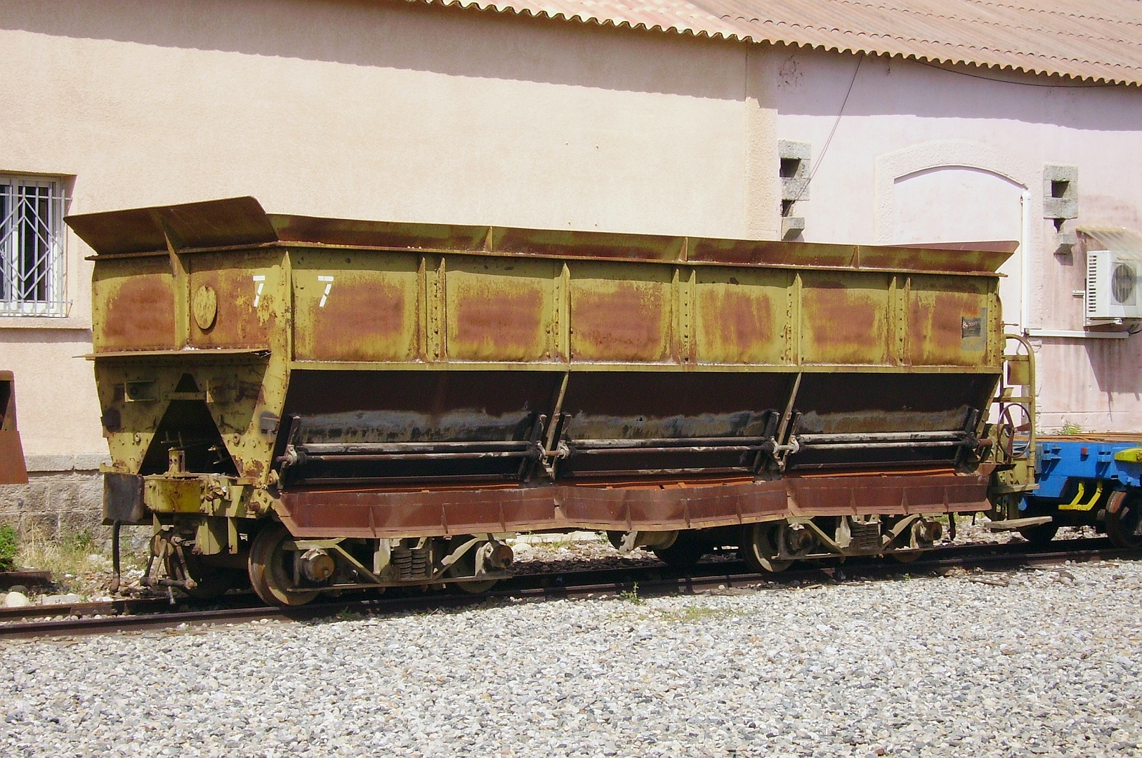 Le wagon-trémie n° Ty 7 en gare de Corte le 22 juillet 2009.